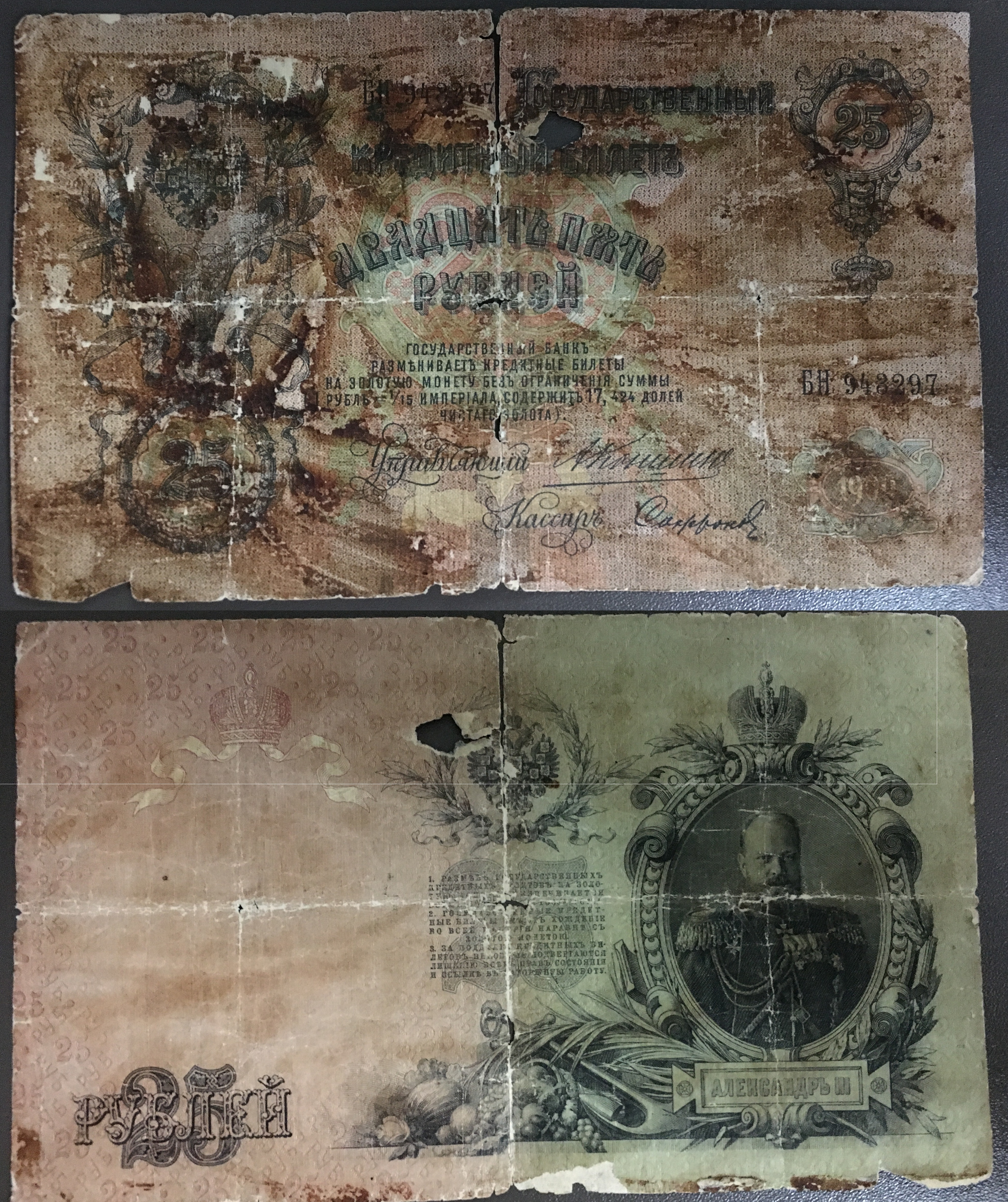 Банкнота со следами крови, осталась после смерти П.А. Столыпина, в момент покушения на него, находилась у него в кармане.